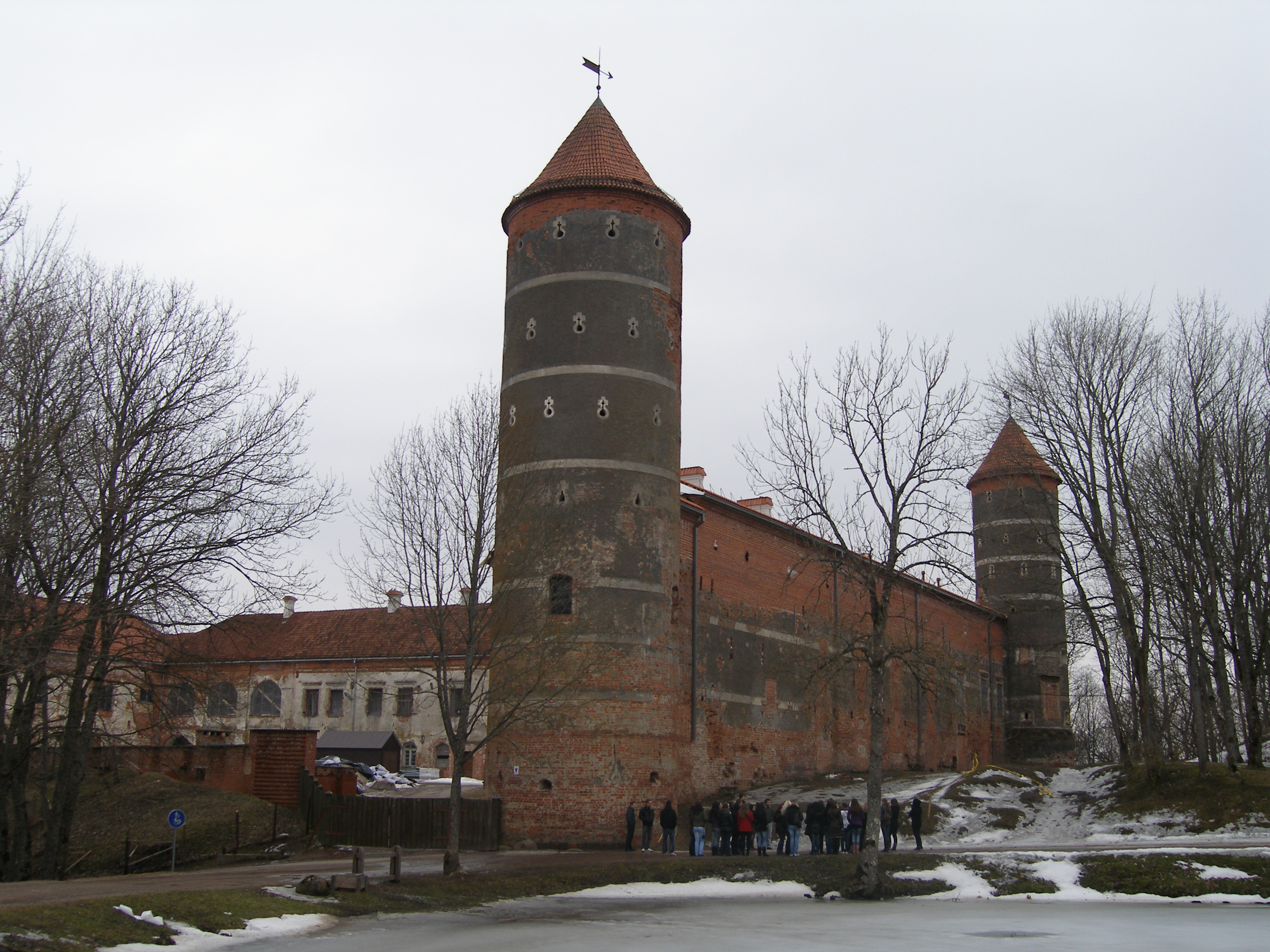 Panemunės pilis